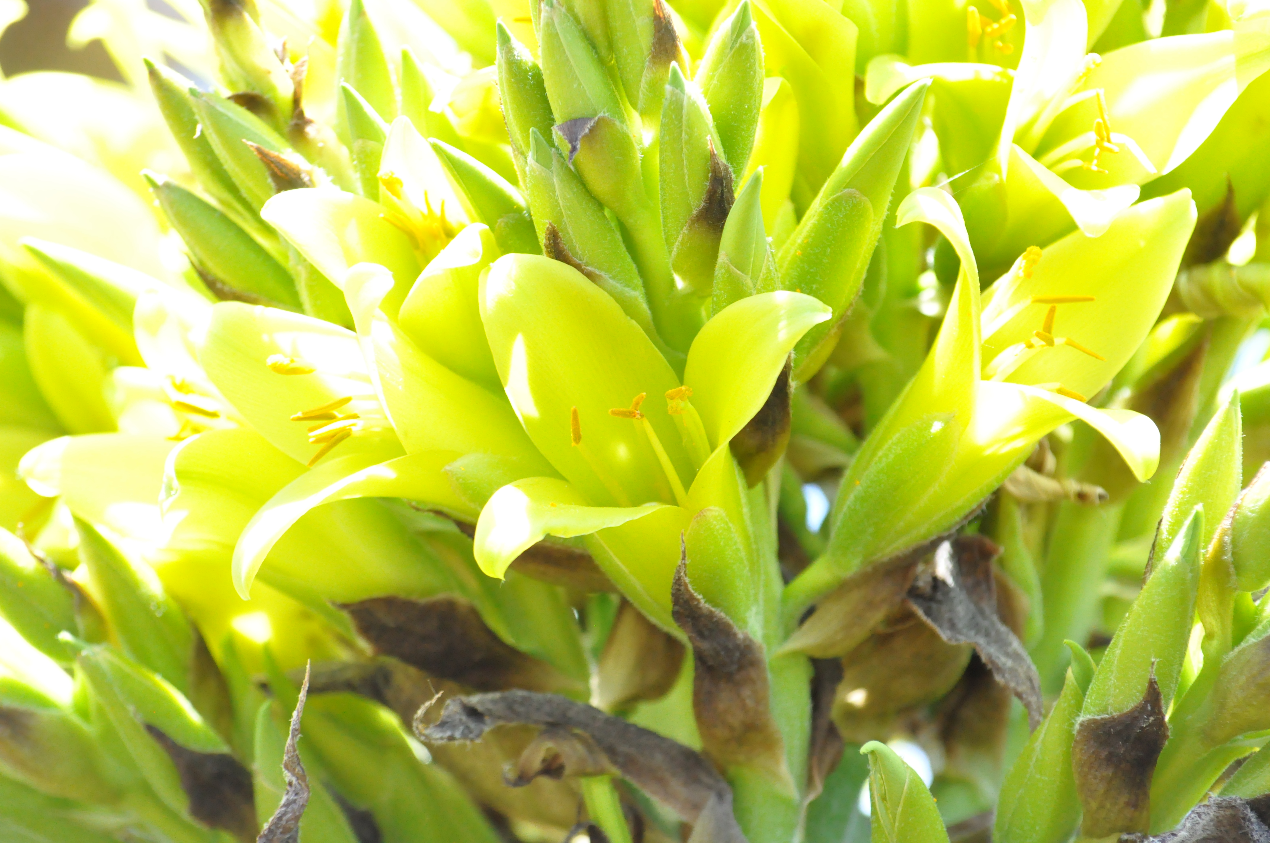 Puya chilensis, ejemplares del Cerro La Cruz en Zapallar, Chile